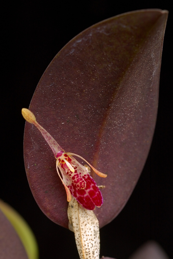 Restrepia muscifera